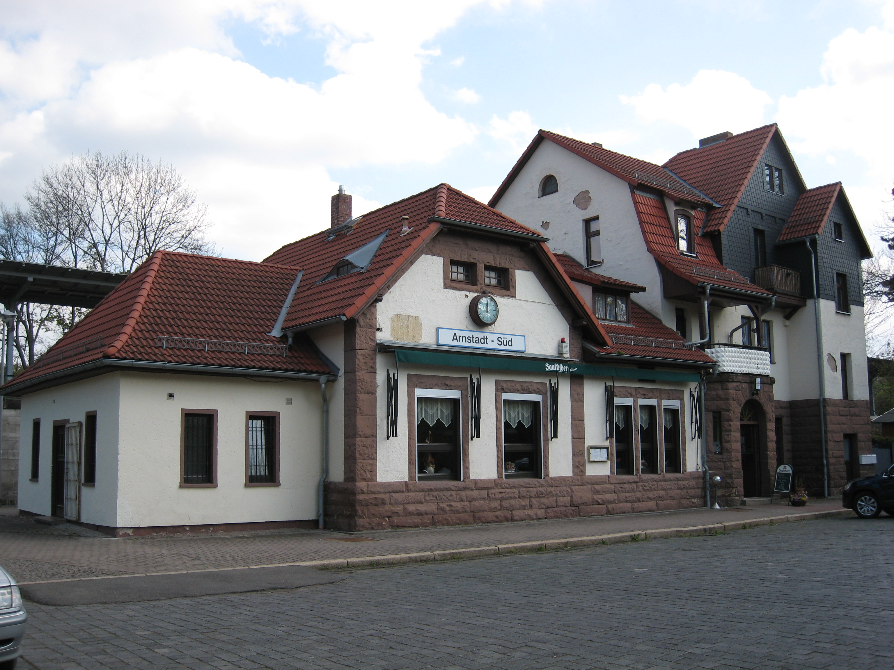 Der Südbahnhof in Arnstadt.